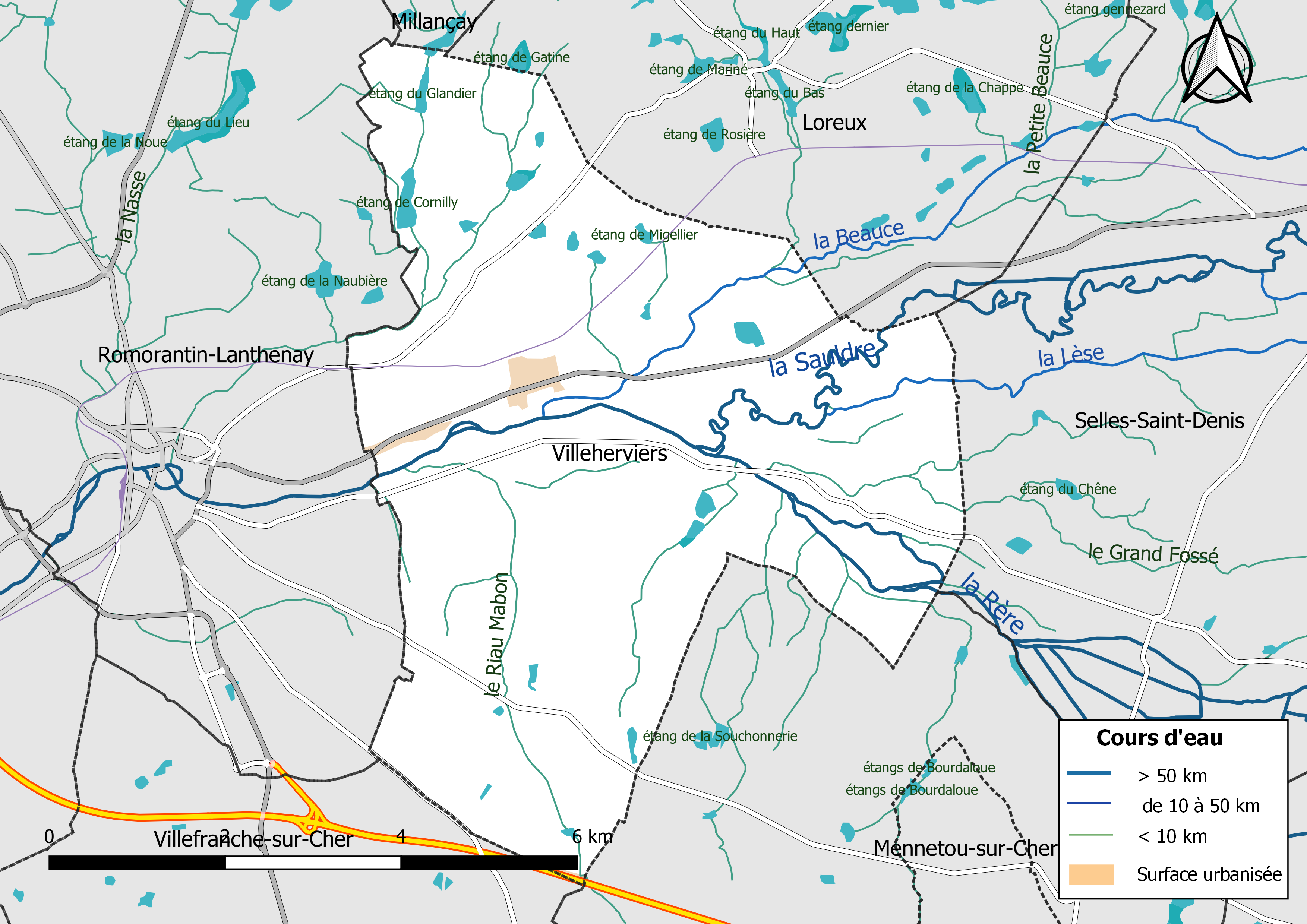 Carte du réseau hydrographique de la commune de Villeherviers (Loir-et-Cher, France).